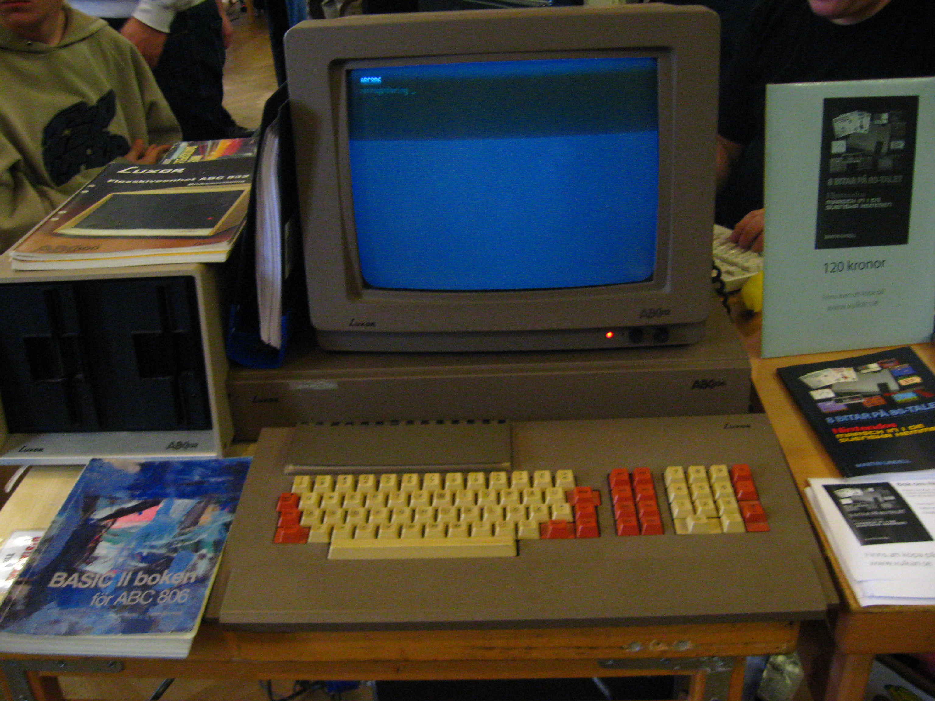 Photo taken at Retro Gatering, Stockholm, 27 Sep 2008.